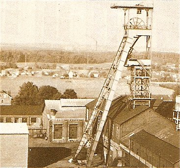 La Fosse n° 8 de la Compagnie des mines de l'Escarpelle était un charbonnage constitué d'un seul puits situé à Auby, Nord, Nord-Pas-de-Calais, France.